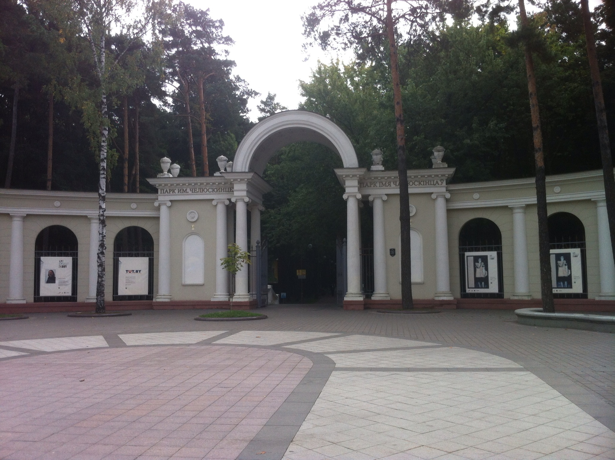 Парк імя Чэлюскінцаў. г. Менск This is a photo of Belarusian heritage monument. Reference number: 713Г000153 ( WLM)